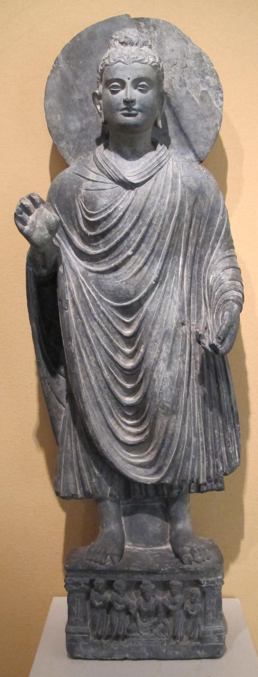 Buddha in piedi shakyamuni, gandhara, slate, fine II sec